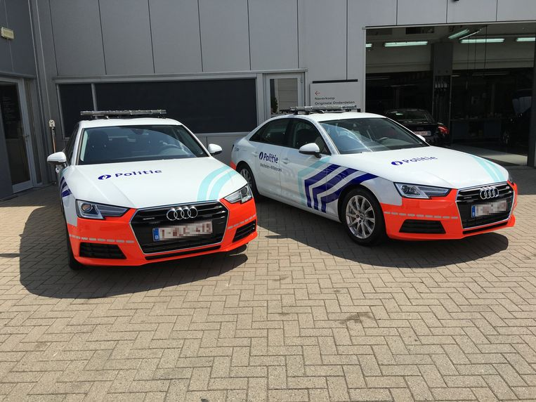 Wagen van de lokale politie in Mechelen